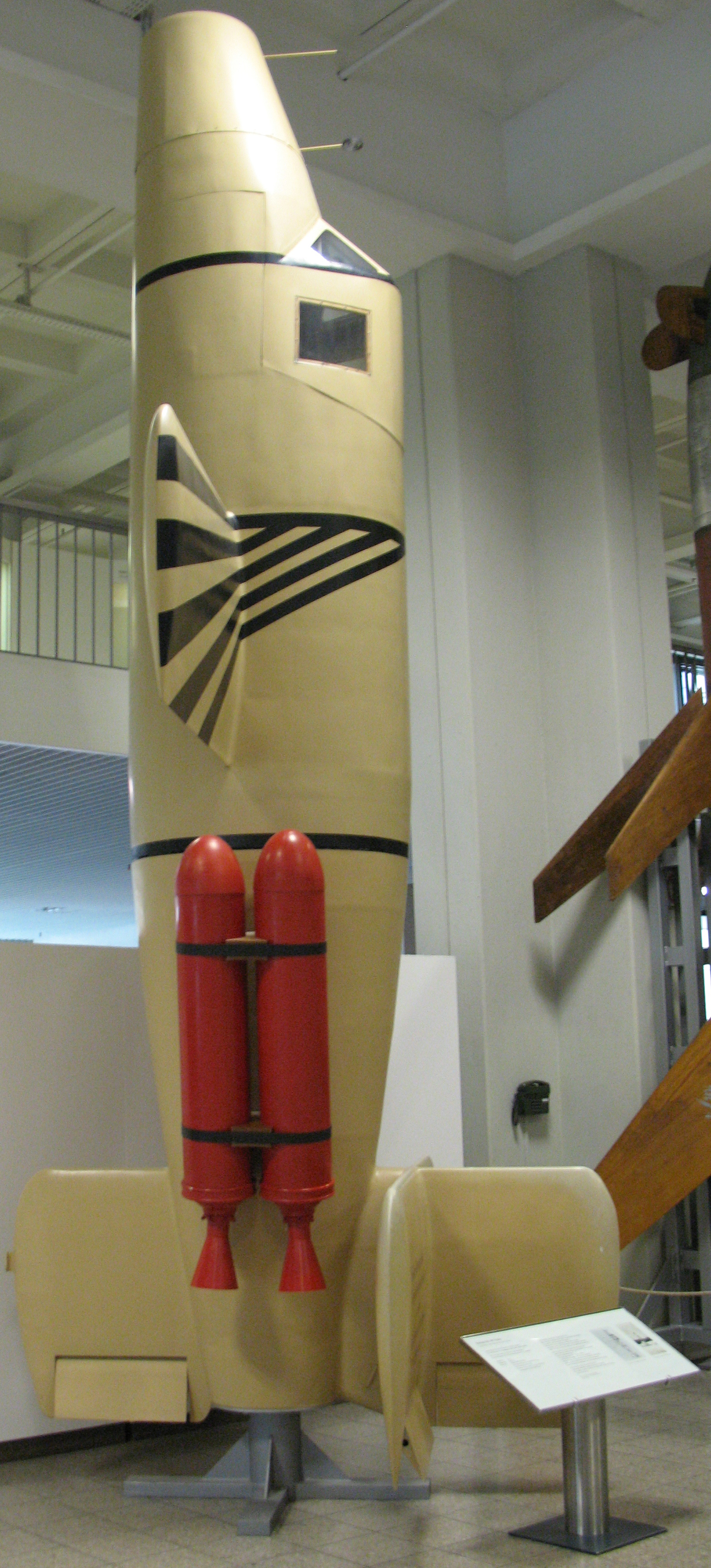 Bachem Ba 349 Natter; Bachem-Werk GmbH, Waldsee/Württemberg, 1944/45